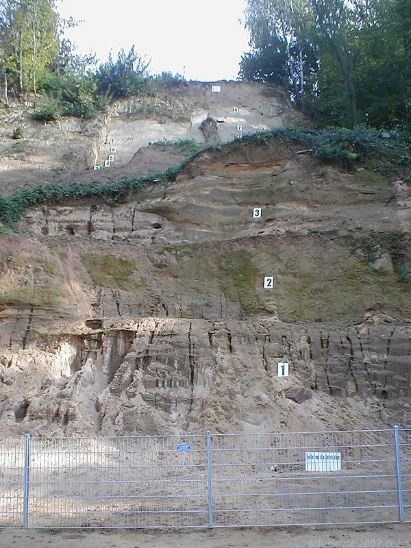 Sandgrube in Mauer, Baden-Württemberg, Deutschland. Fundort (1907) des Homo heidelbergensis. Die genaue Fundstelle des Fossils befindet sich ca. 100 m entfernt (schräg rechts hinten) unter 25 Meter hohem Füllmaterial, mit dem die Sandgrube nach ihrer Stilllegung aufgefüllt wurde. Bereich im Naturschutzgebiet „Sandgrube am Grafenrain“